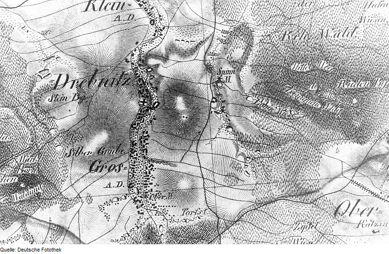 Original image description from the Deutsche Fotothek Bischofswerda-Großdrebnitz. Oberreit, Sect. Stolpen, 1821